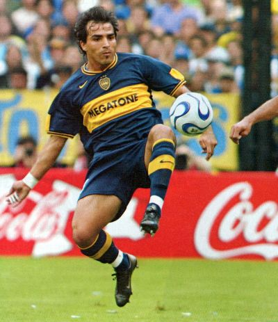 boca juniors